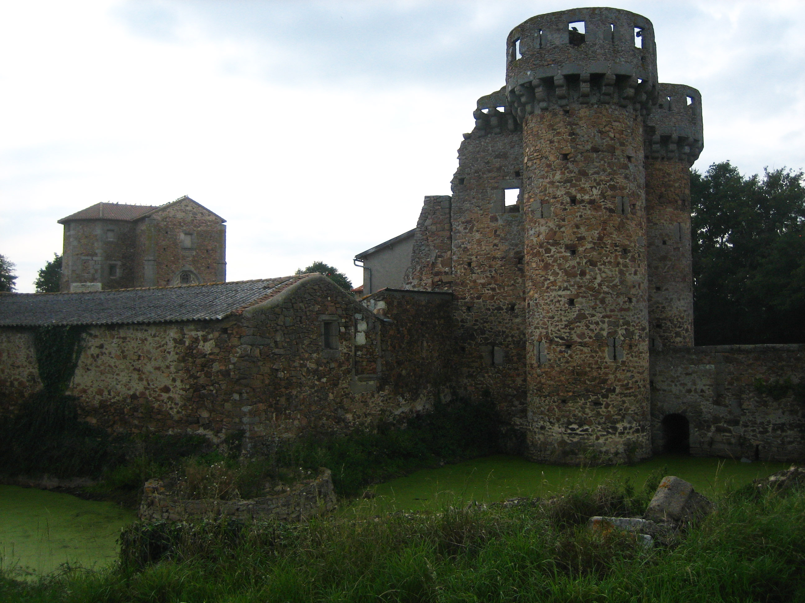 Château de Sanzay .